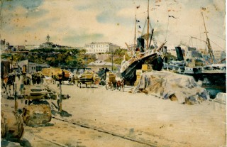 Scene in Odessa